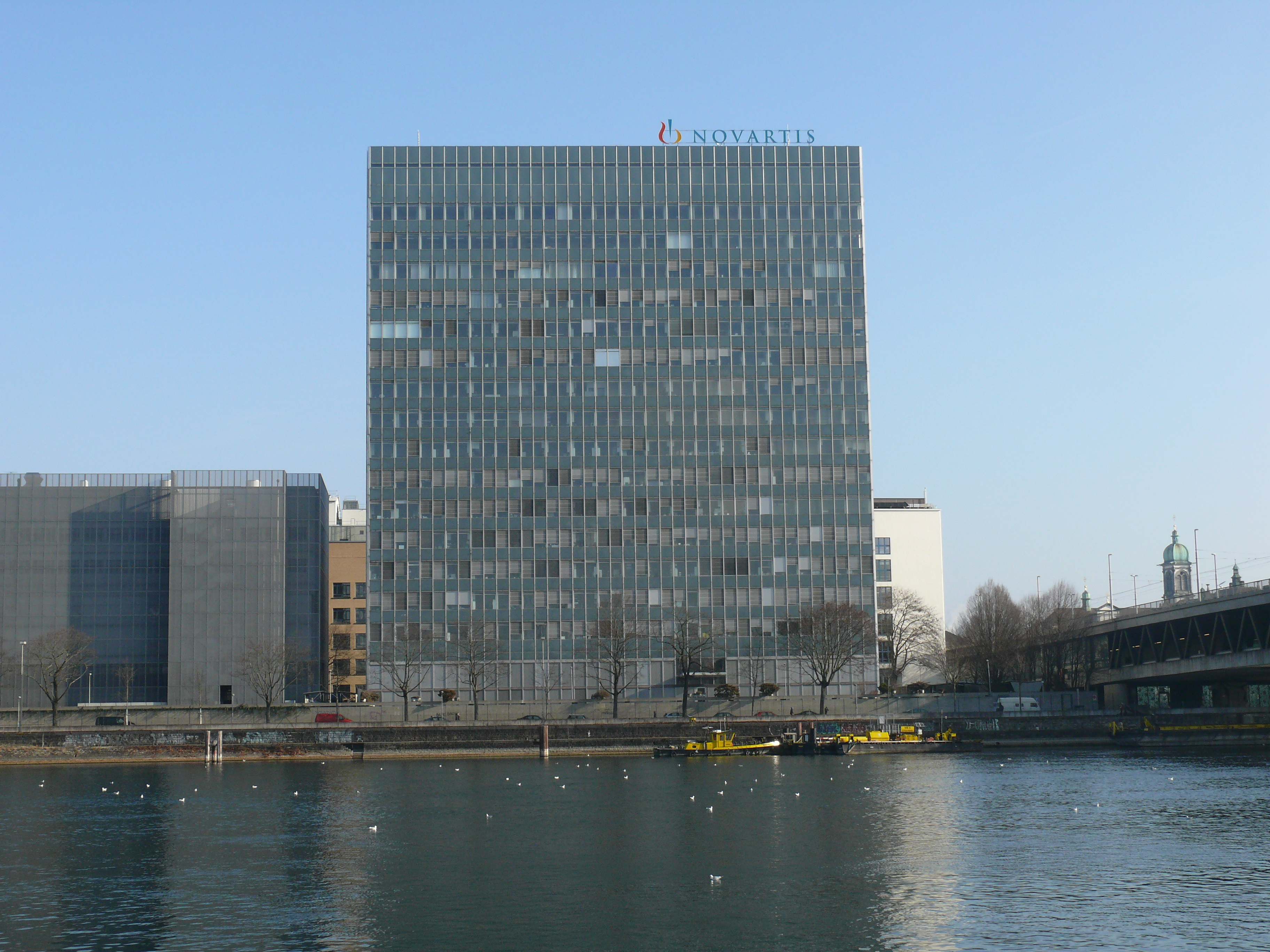 Das Hochhaus K25 gegenüber dem Novartis-Campus in Basel.